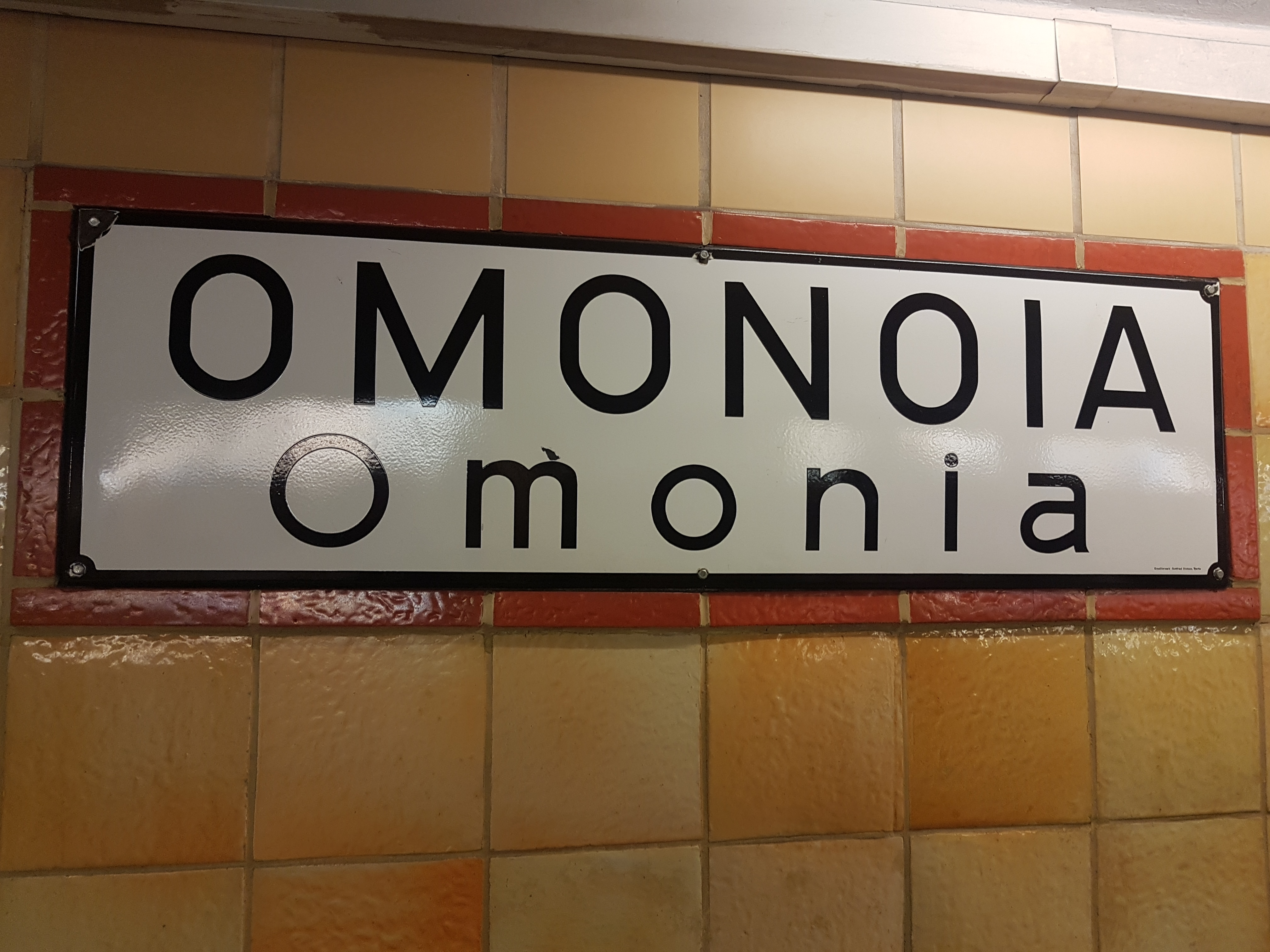 Plaque émaillée de la station de métro Omonia d'Athènes (lignes 1 et 2).